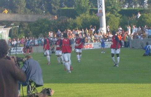 Remplaçants issus du centre de formation de Bordeaux pendant le match de préparation à Agen contre Marseille.